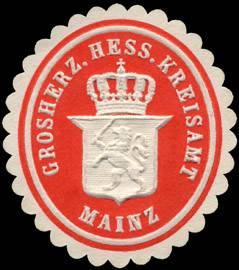 Sealing stamp Title: Grossherzoglich Hessisches Kreisamt - Mainz Description: rot, weiß, geprägt Place: Mainz size: 4x3 cm